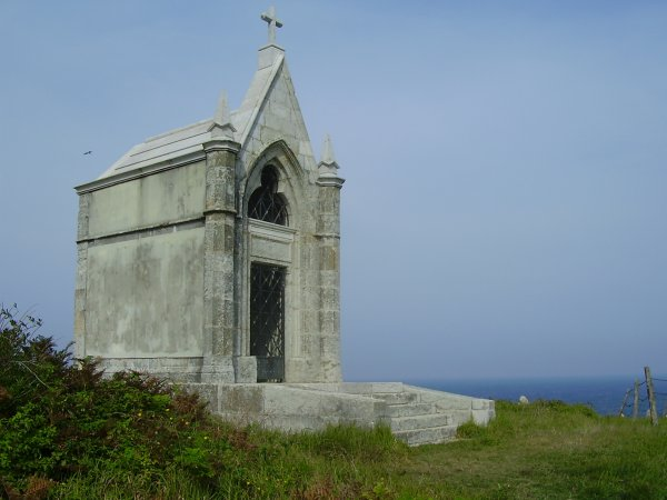 Panteón del Inglés en Cueto (Santander, Cantabria, España) RPLl_GyR_ 8 de septiembre de 2006.